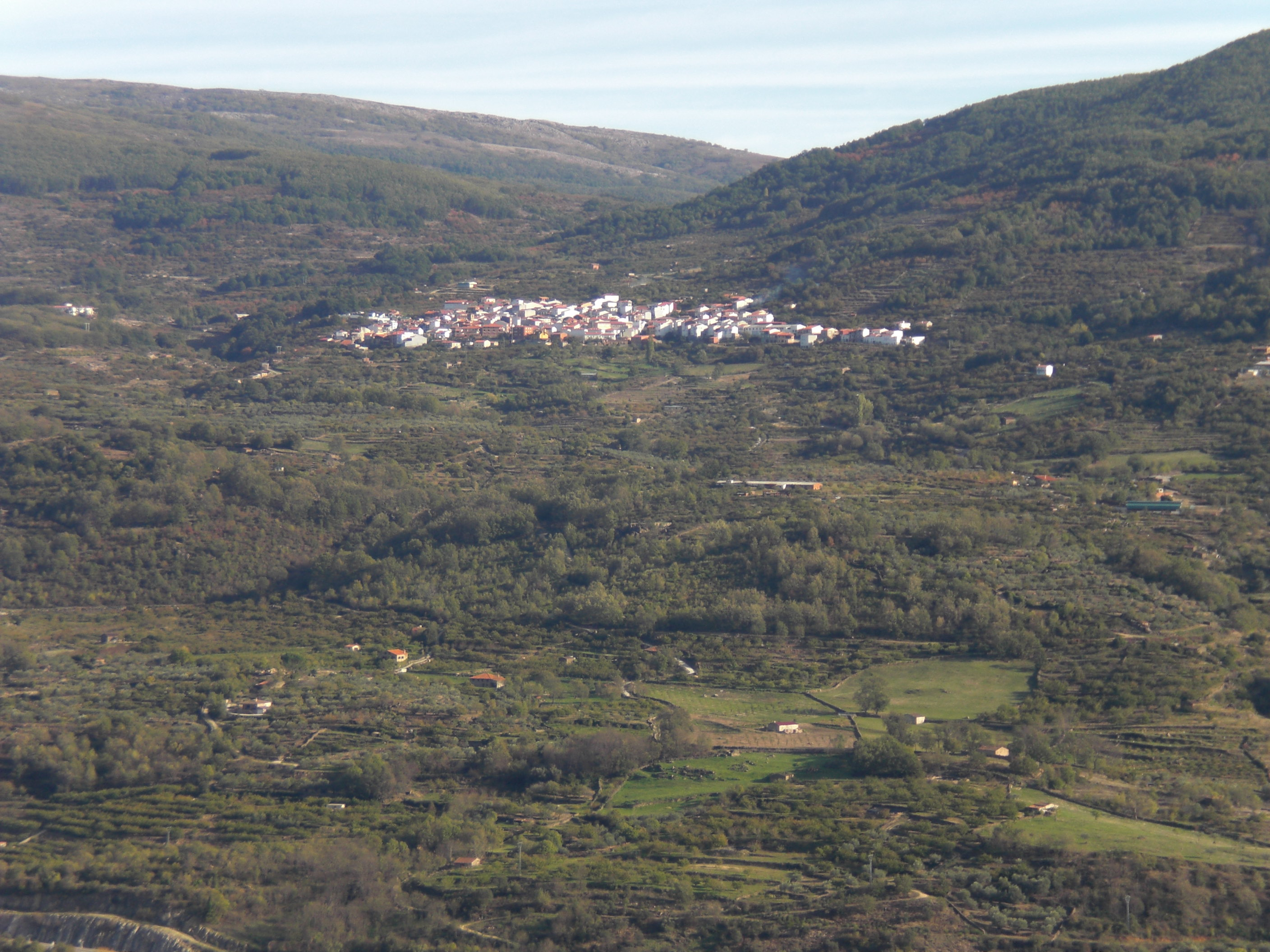 panoramo de Casas del Castañar en Hispanio